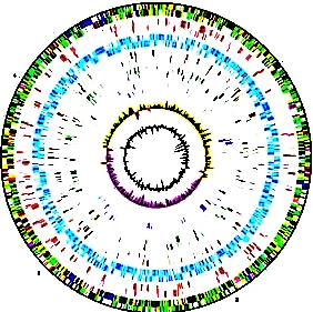 ภาพแผนที่ genome ของแบคทีเรีย Salmonella typhimulium